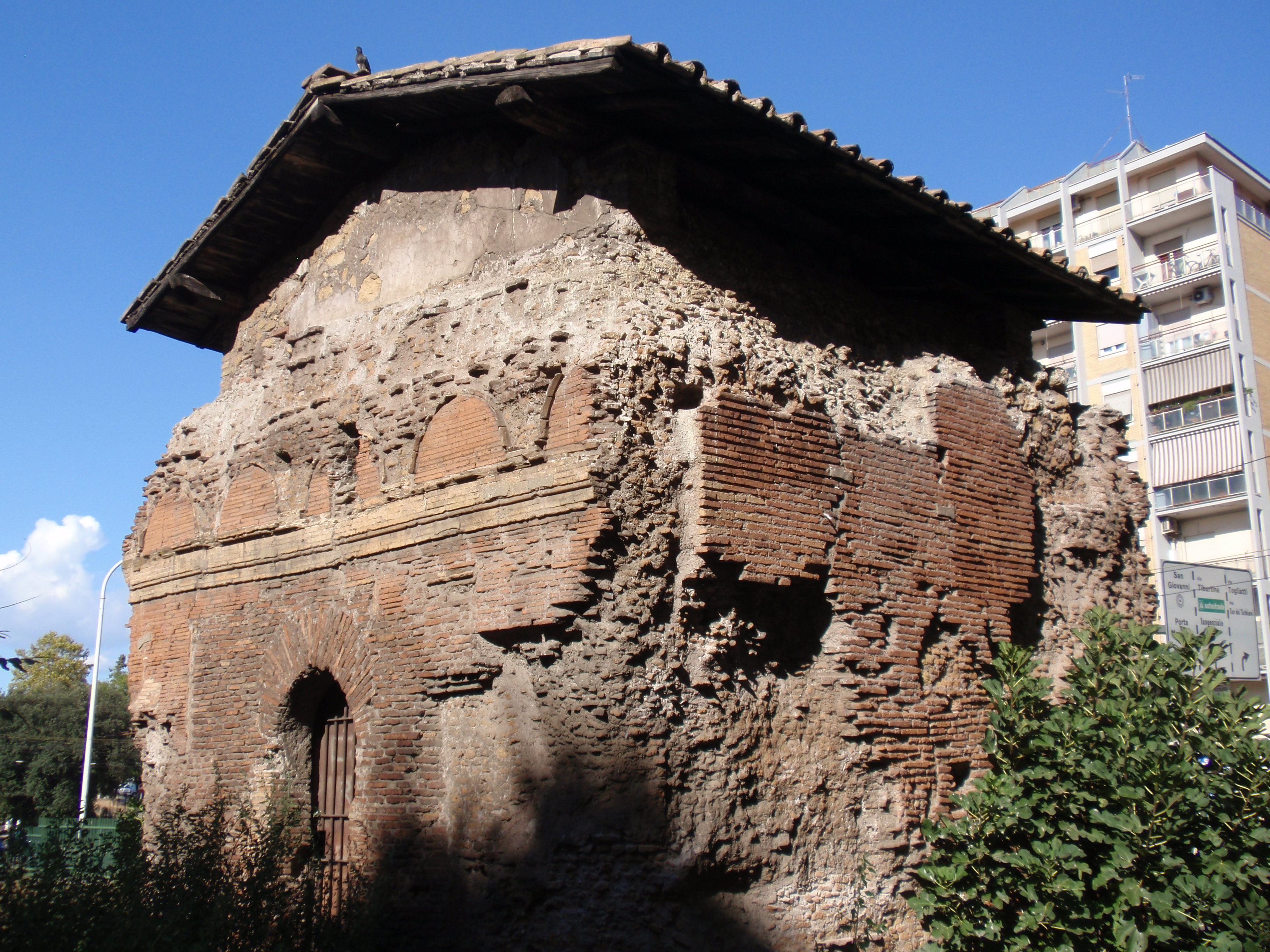 Vista del Colombario di Largo Preneste. This is a photo of a monument which is part of cultural heritage of Italy.